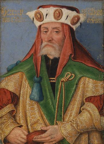 Hermann Billung, Herzog, gestorben 973